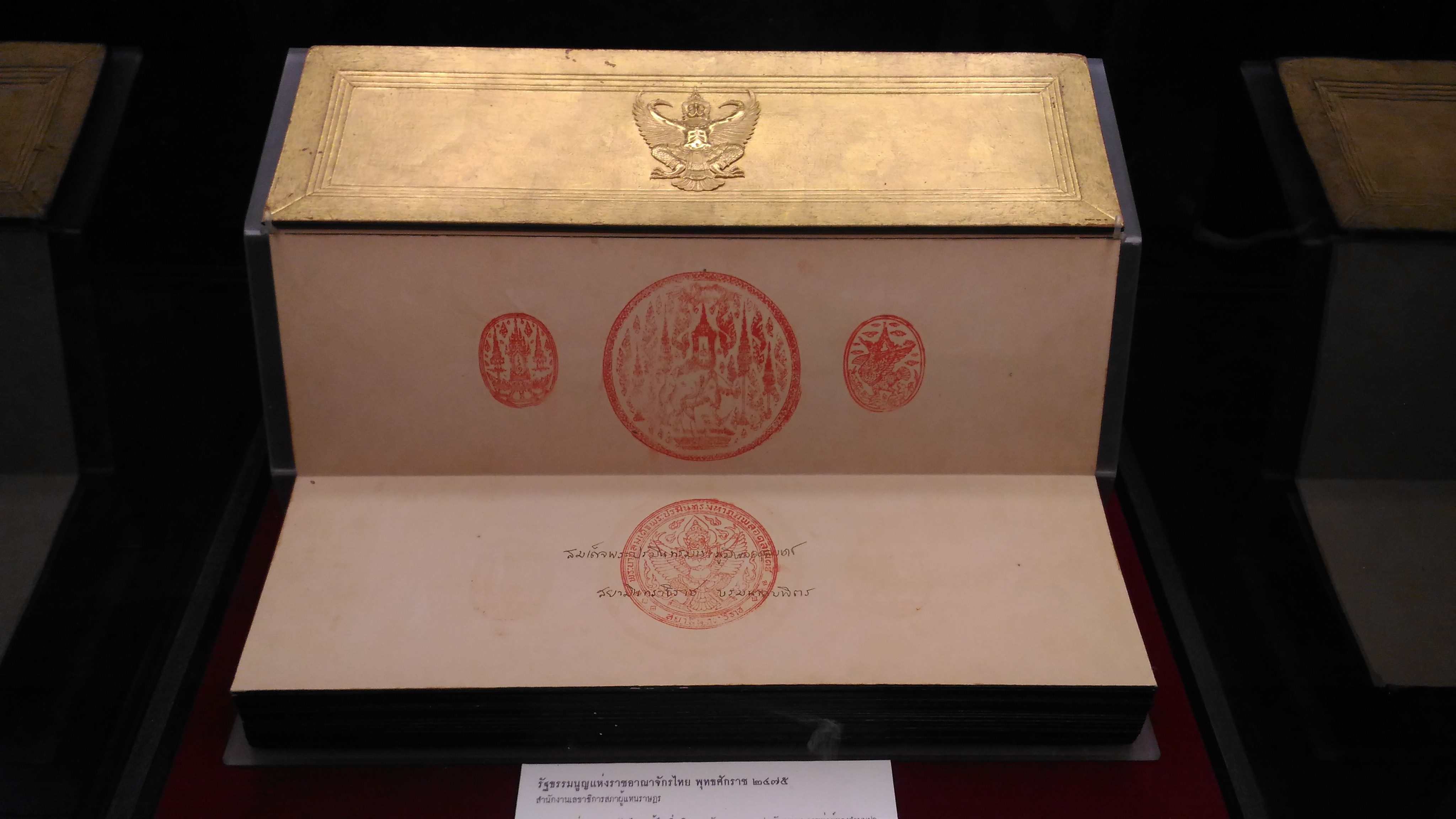 หน้าต้นของรัฐธรรมนูญแห่งราชอาณาจักรไทย พุทธศักราช ๒๔๗๕ ฉบับแก้ไขเพิ่มเติม พ.ศ. ๒๔๙๕ สำนักงานเลขาธิการสภาผู้แทนราษฎรให้พิพิธภัณฑสถานแห่งชาติ พระนคร ยืมจัดแสดง ในงานมหกรรมพิพิธภัณฑ์ไทย Thailand Museum Expo 2016 อัศจรรย์พิพิธภัณฑ์ไทย เนื่องในวันพิพิธภัณฑ์ไทย ๒๕๕๙ ระหว่างวันที่ ๑๖-๒๑ กันยายน ๒๕๕๙ หน้าต้นของรัฐธรรมนูญฉบับนี้ประทับพระราชลัญจกรมหาโองการ พระราชลัญจกรไอยราพด และพระราชลัญจกรหงสพิมาน ถัดลงมาเป็นพระราชลัญจกรพระครุฑพ่าห์รัชกาลที่ ๙ ประทับกำกับพระปรมาภิไธย "สมเด็จพระปรมินทรมหาภูมิพลอดุลยเดช สยามินทราธิราช บรมนาถบพิตร" คำบรรยายในการจัดแสดงระบุรายละเอียดไว้ดังนี้ รัฐธรรมนูญแห่งราชอาณาจักรไทย พุทธศักราช ๒๔๗๕ สำนักงานเลขาธิการสภาผู้แทนราษฎร รัฐธรรมนูญแห่งราชอาณาจักรไทย แก้ไขเพิ่มเติม พุทธศักราช ๒๔๙๕ ประทับตราพระครุฑพ่าห์ทองคำบนปก นับเป็นรัฐธรรมนูญ (สมุดไทย) ฉบับแรกที่พระบาทสมเด็จพระเจ้าอยู่หัวรัชกาลปัจจุบันทรงลงพระปรมาภิไธย ประกาศใช้เมื่อวันที่ ๘ มีนาคม ๒๔๙๕ ถึงวันที่ ๒๐ ตุลาคม ๒๕๐๑ 1932 Constitution of the Kingdom of Thailand' Bangkok Period, King Rama VII and King Rama IX's reigns Thai Parliament Museum The Constitution of the Kingdom of Thailand amendment 1952 was embossed with the gold Garuda Seal on the cover. This is the first Constitution that King Rama IX has given his Signature and announced to use on 8th March 1952 - 20th October 1958. ภาพถ่ายโดย user:Xiengyod~commonswiki